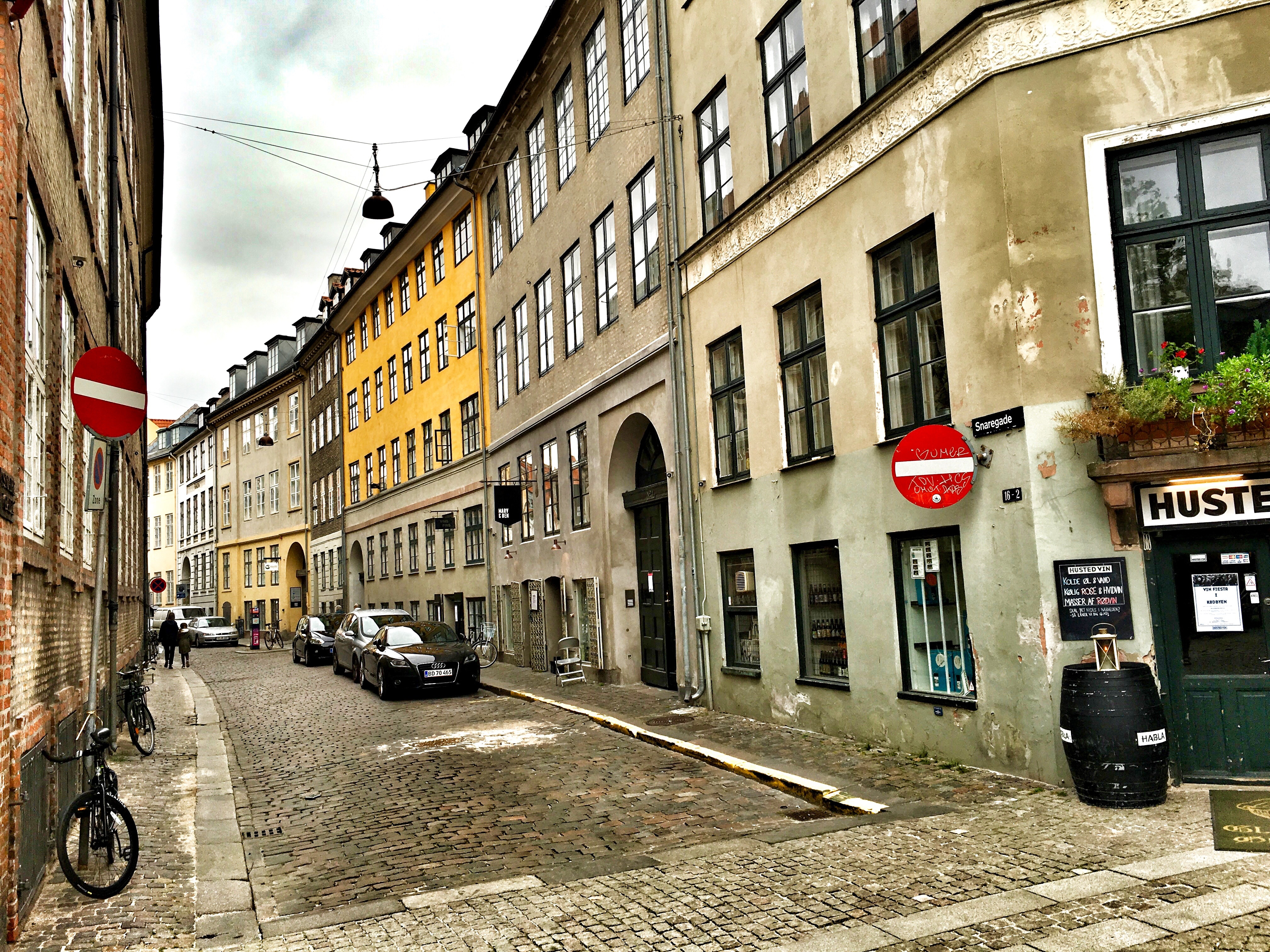 Snaregade, København